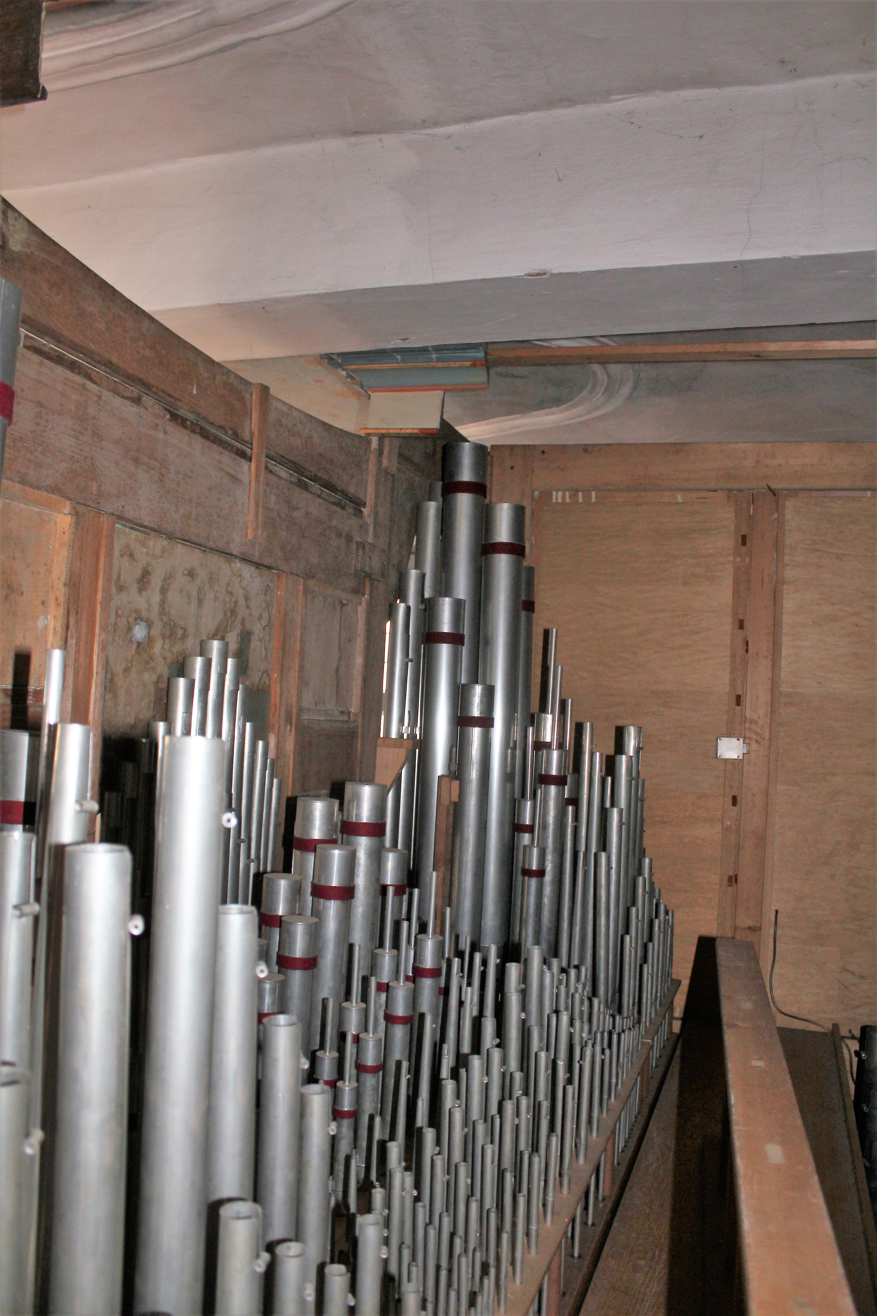 Evangelische Kirche Blasbach, Wetzlar, Lahn-Dill-Kreis, Hessen, Deutschland